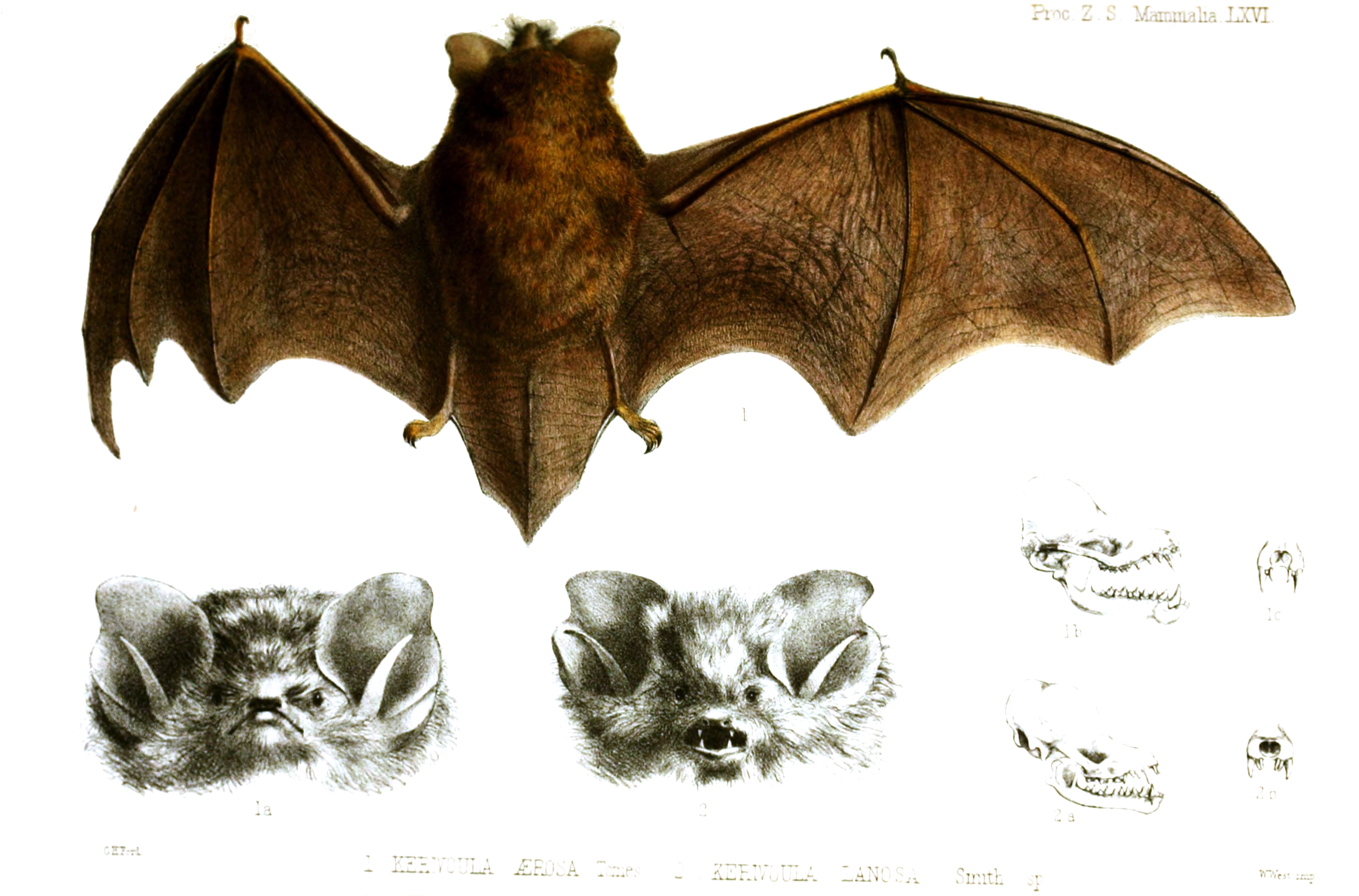 Kerivoula aerosa & Kerivoula lanosa